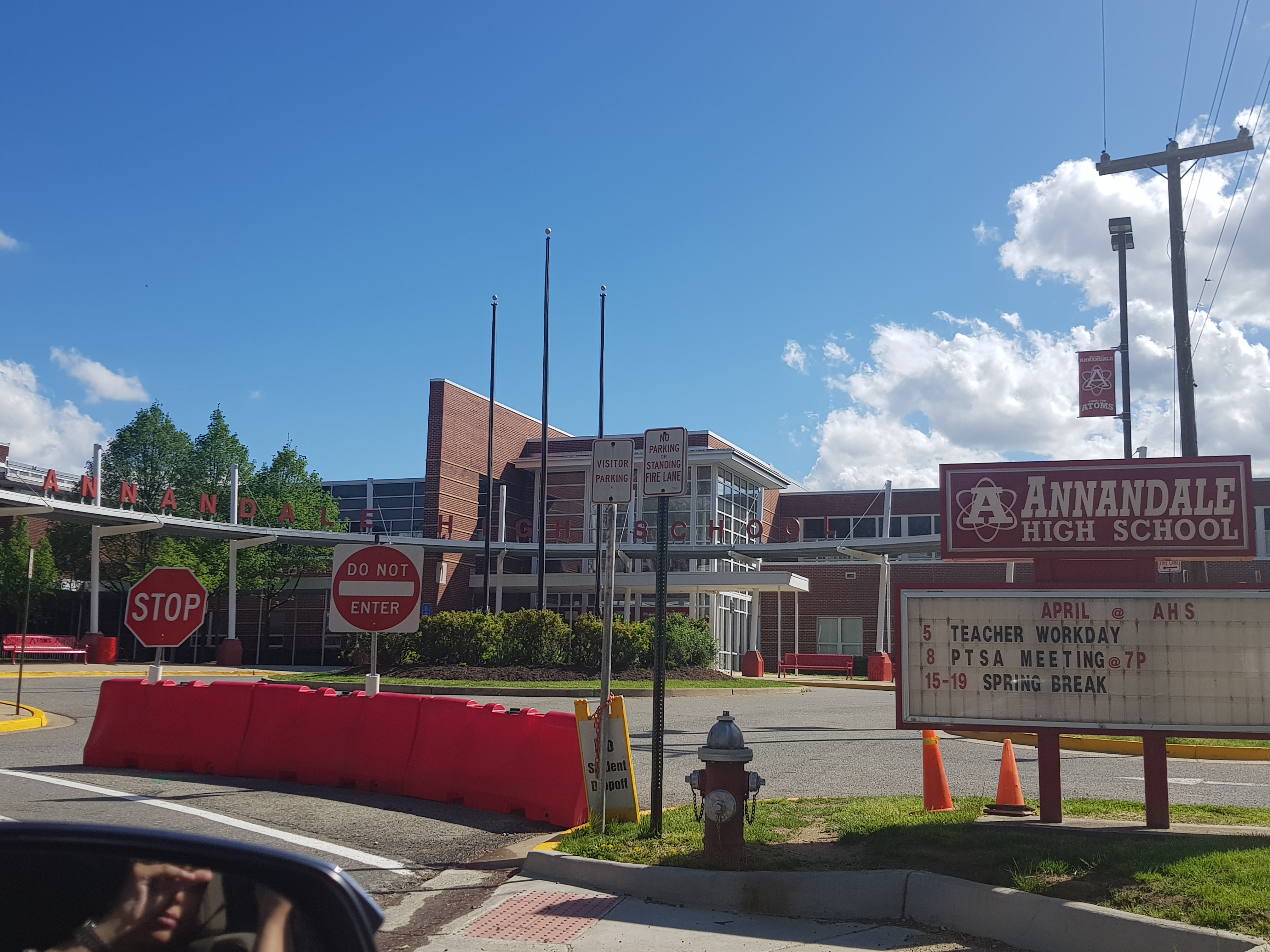 ANNANDALE HIGH SCHOOL